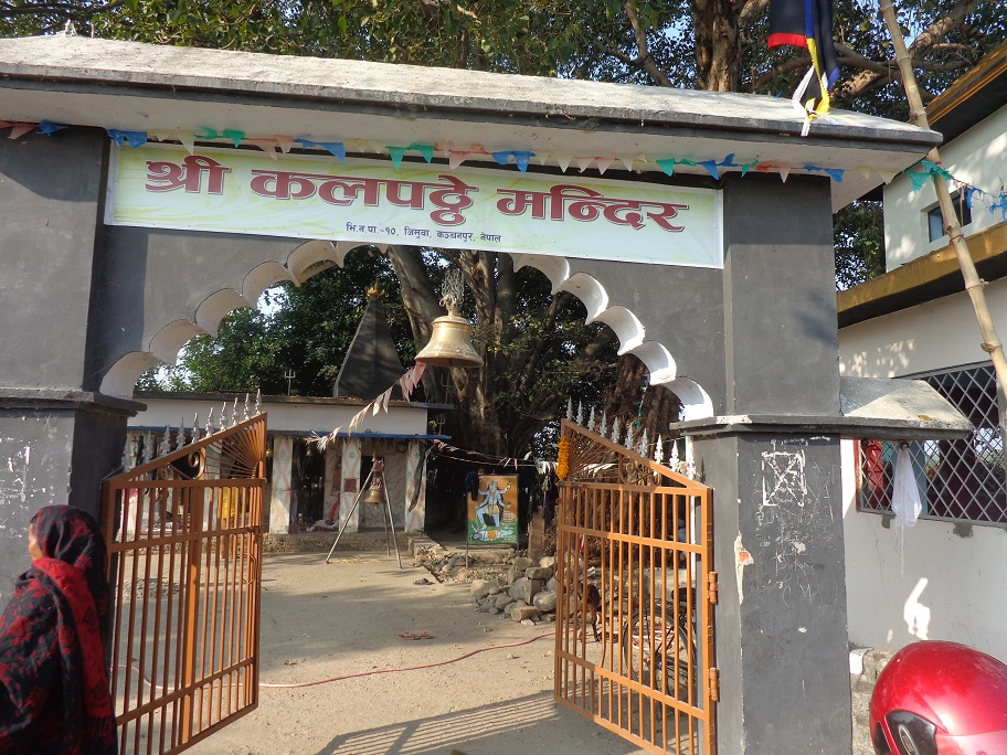 नेपाल भाषा: Kalika